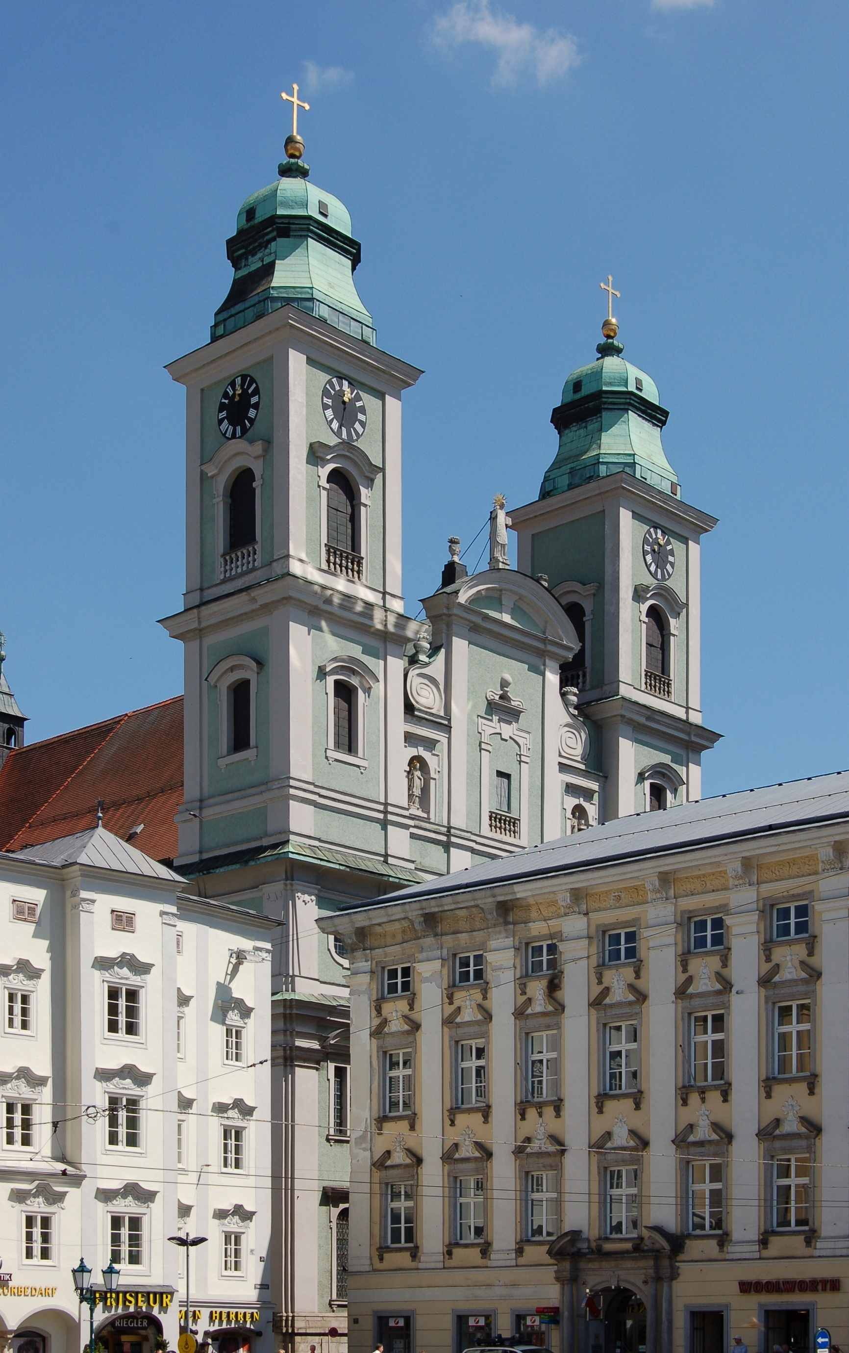 Alter Dom in Linz gesehen vom Hauptplatz, gestürzte Linien korrigiert